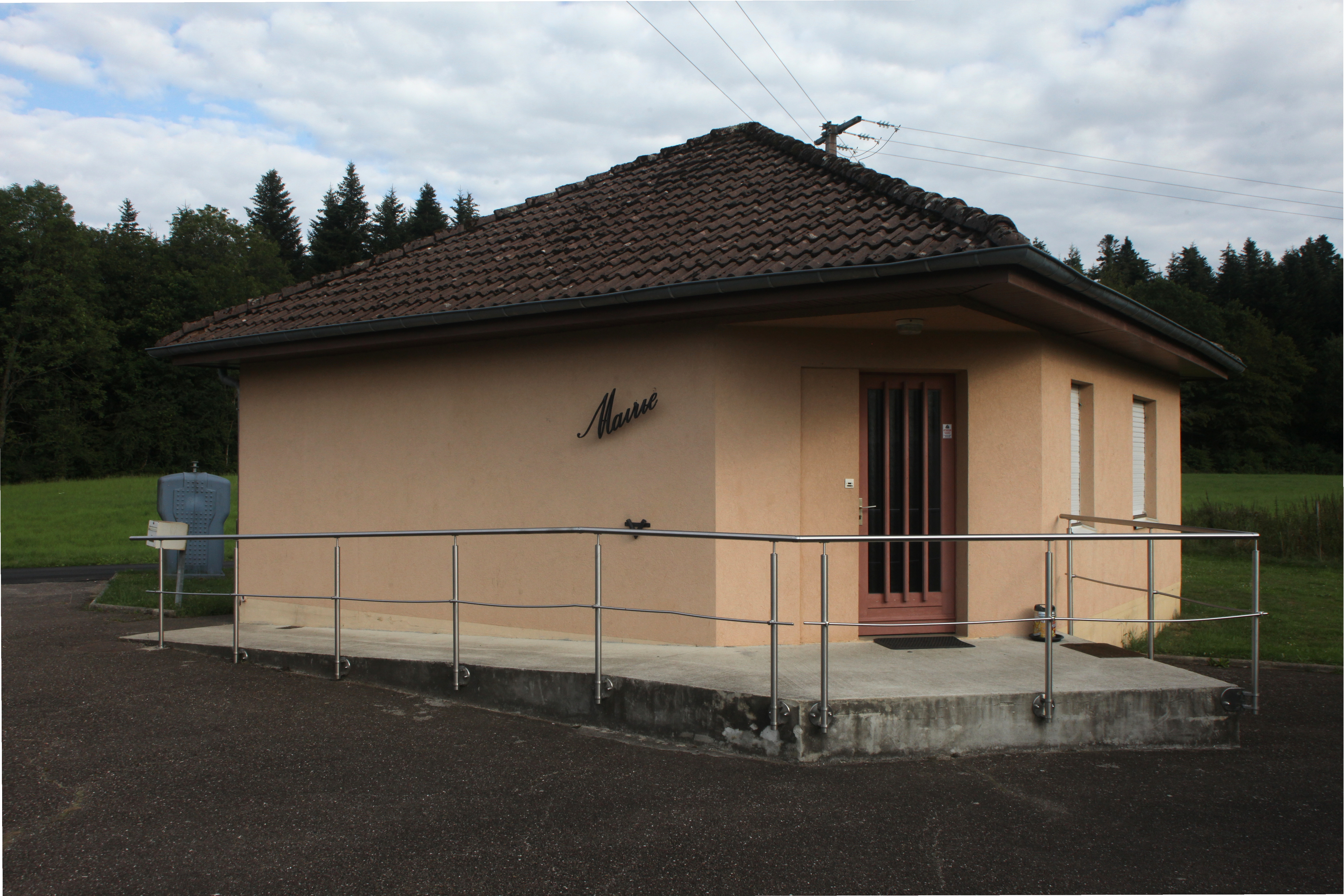 Mairie de La Chevillotte (Doubs).